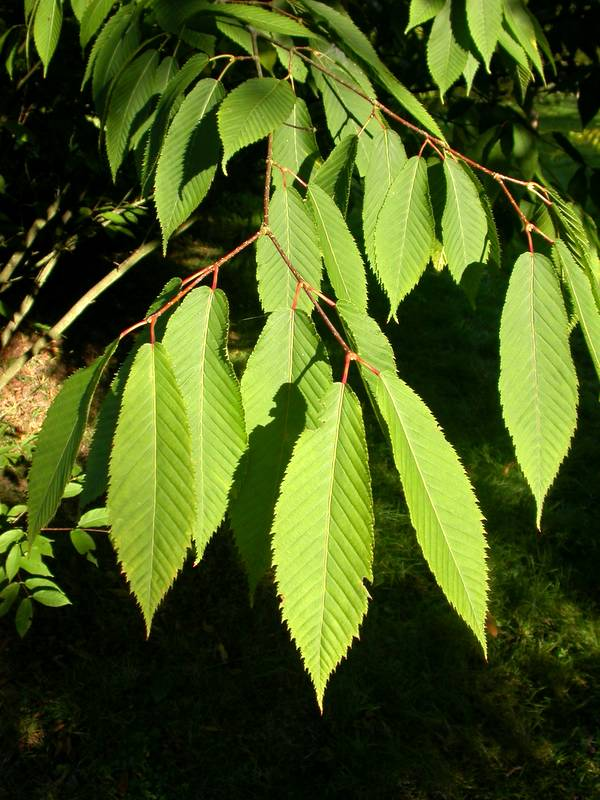 Feuilles d'Acer carpinifolium Acer carpinifolium leaves